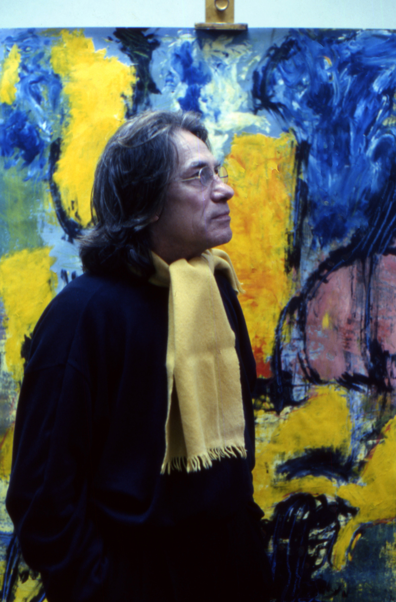 Max Kuatty e una sua Opera 1985